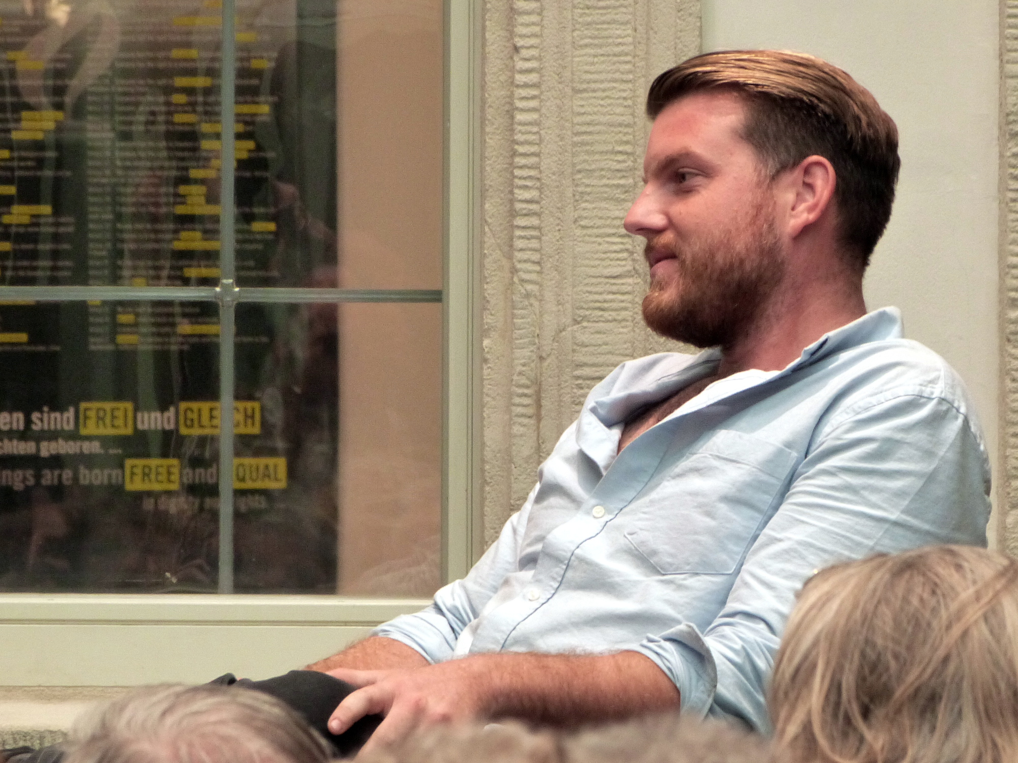 Der Journalist Lucas Vogelsang bei einer Diskussionsrunde auf dem Erlanger Poetenfest 2017.